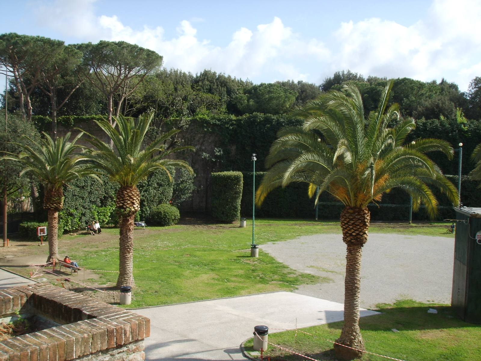 Giardino di Scotto